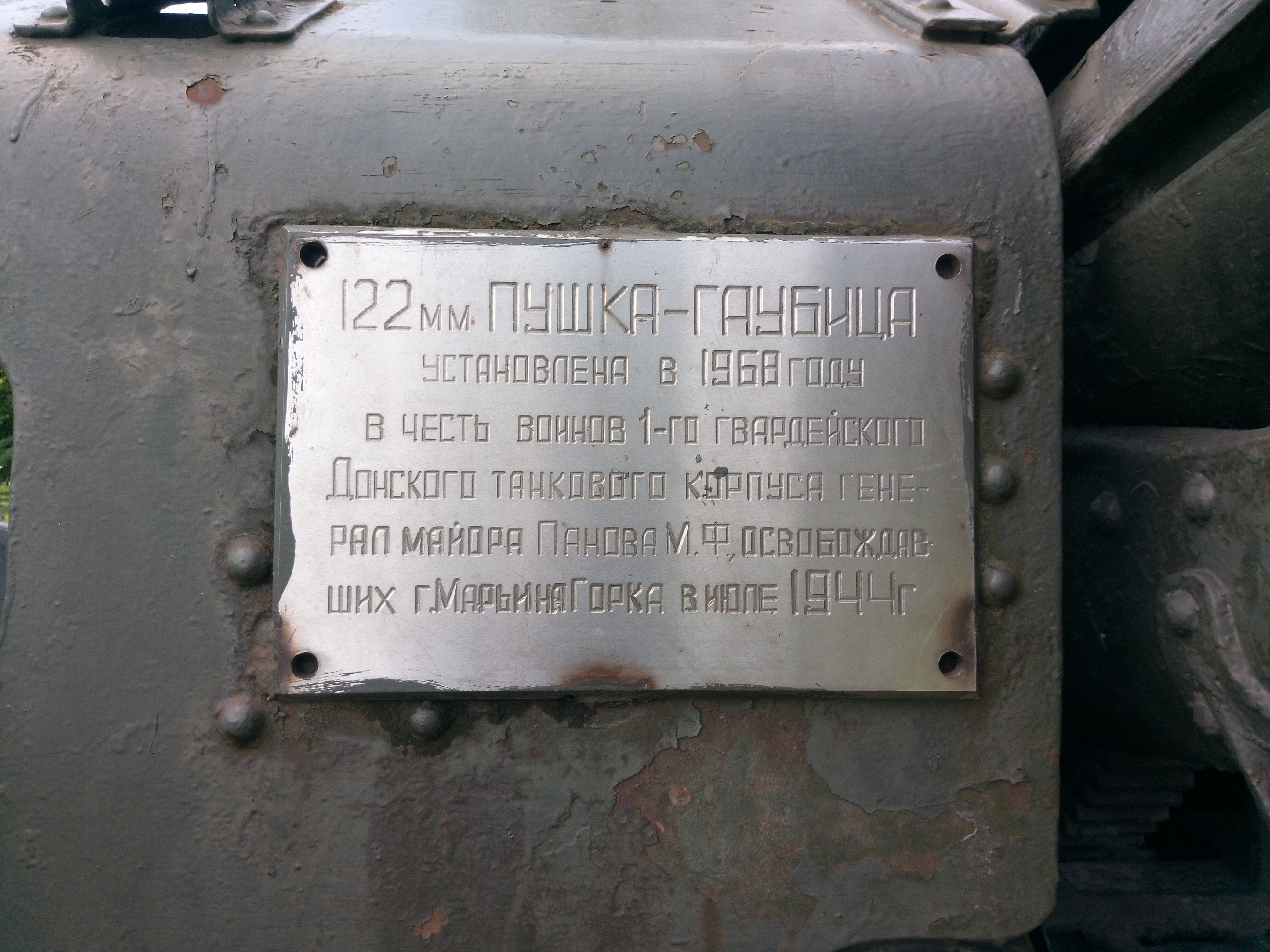 122-мм гармата-гаўбіца. Таблічка.